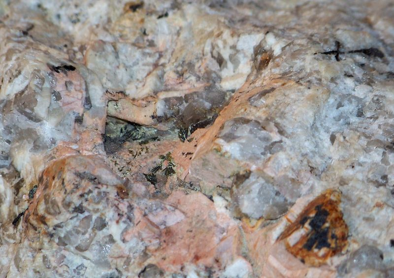 Pegmatyt w aplogranicie, z epidotem, K-skaleniem i kwarcem. Szklarska Poręba-Huta.